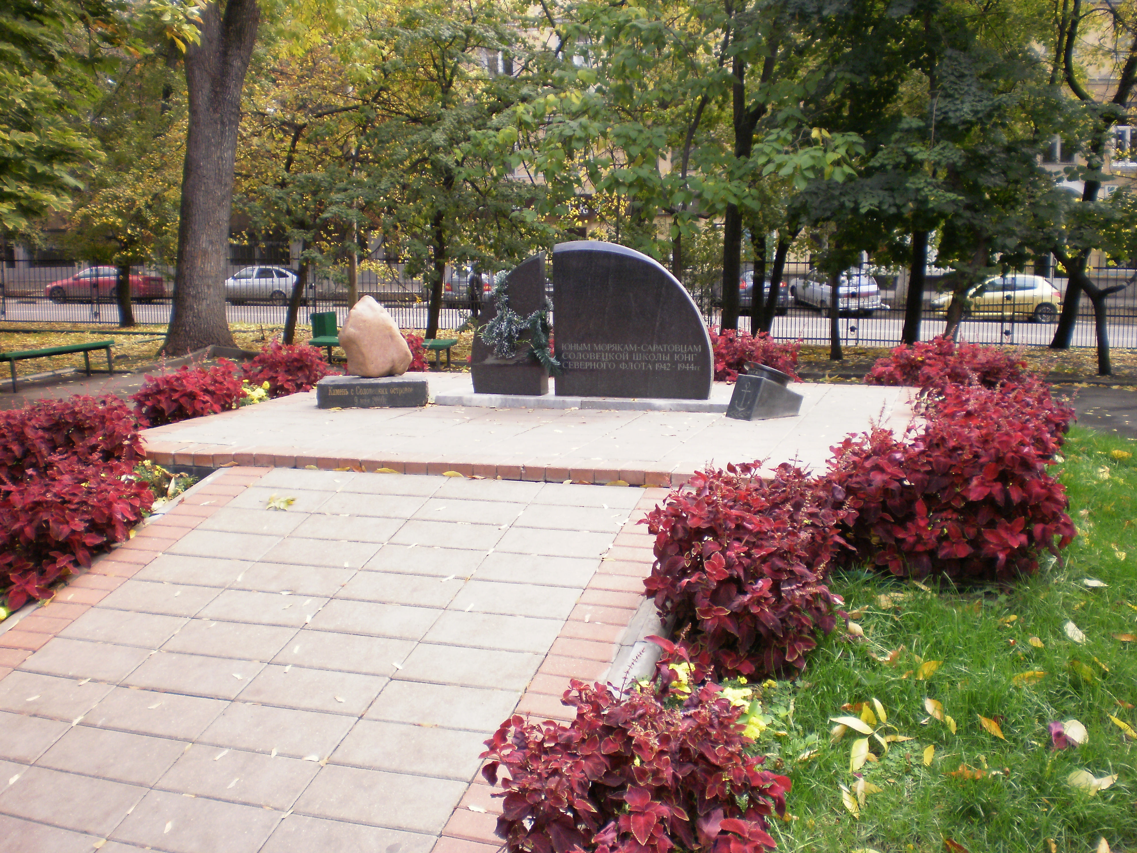 Сад городской «Липки»: улица Волжская, Саратов. Памятник Юным морякам саратовцам соловецкой школы юнг Северного флота 1942-1944 гг., открыт в 2002 г.